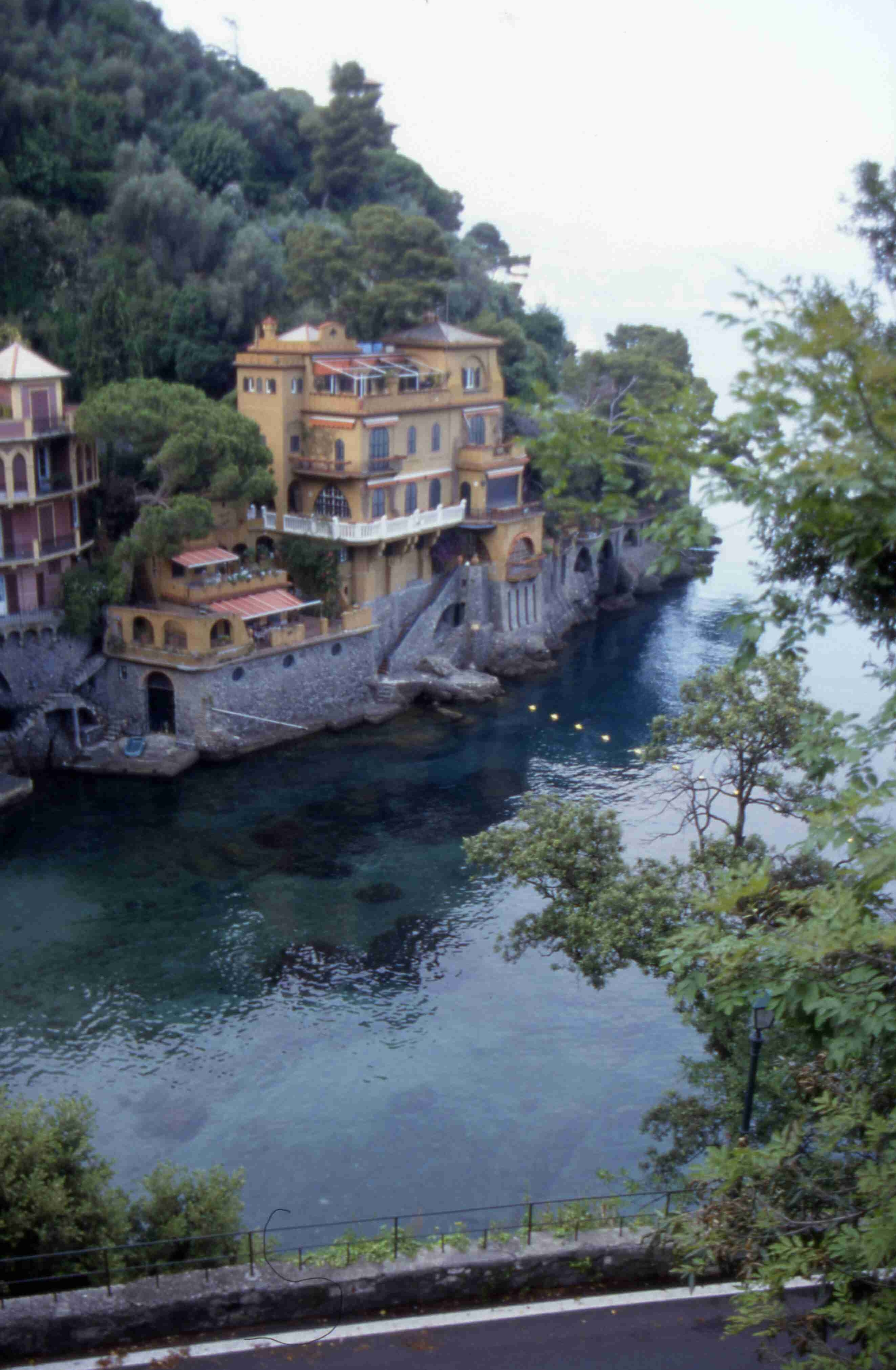 Portofino Ansicht3